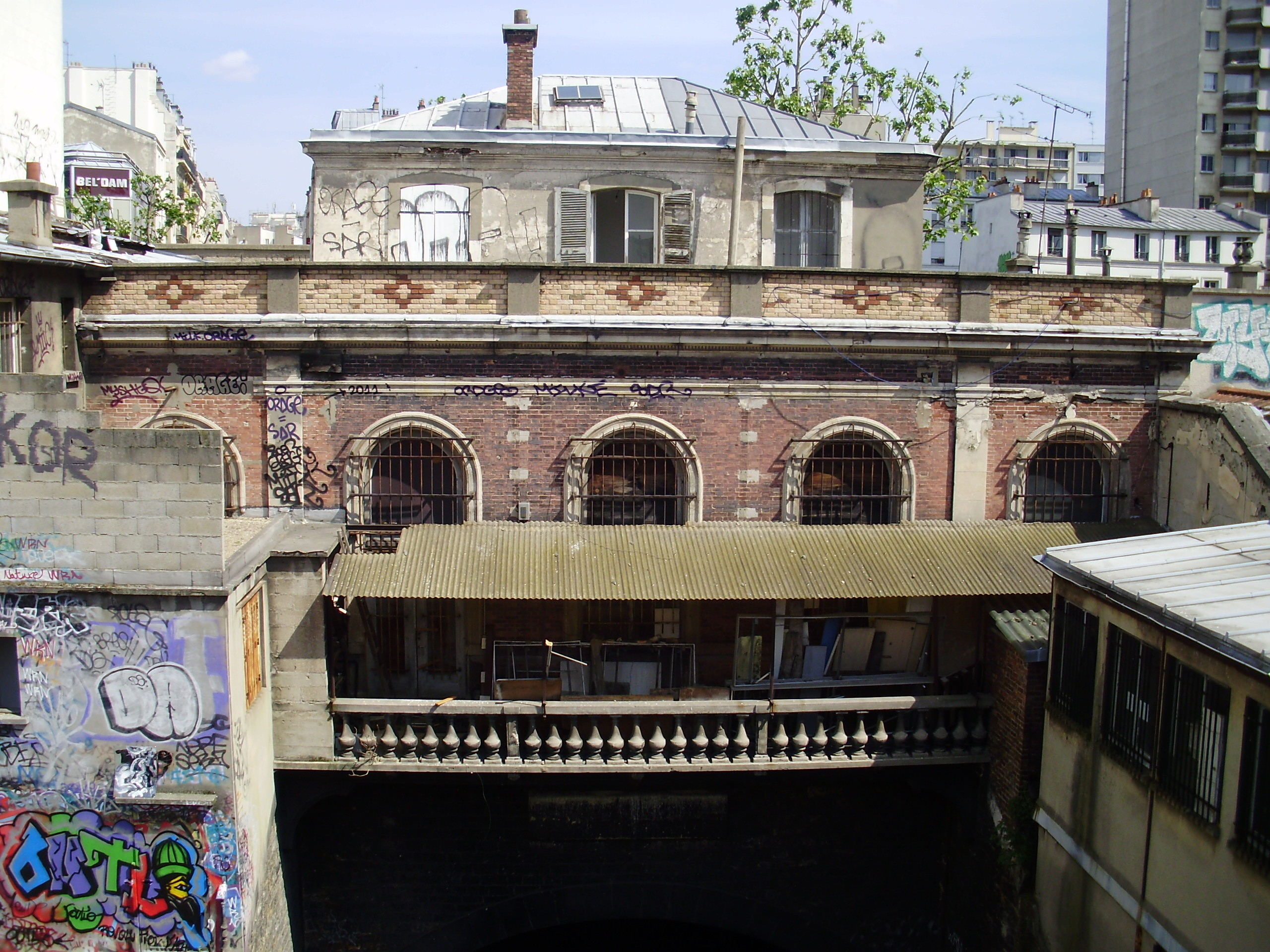 Gare de Montrouge-Ceinture, à Paris (14e), France : revers de la gare